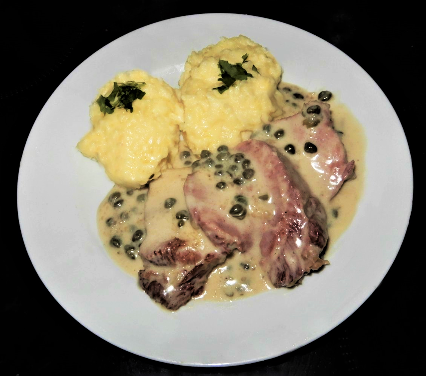 Rindszunge in Sahnesauce mit Kapern